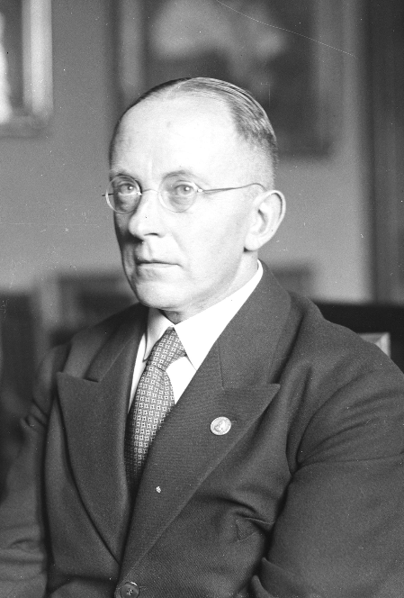 Портретна фотография на Макс Фасмер, германски езиковед